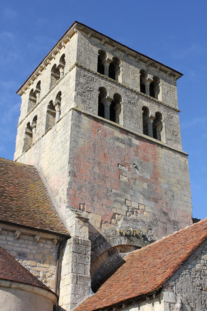 Eglise Saint Laurent de Béard le clocher